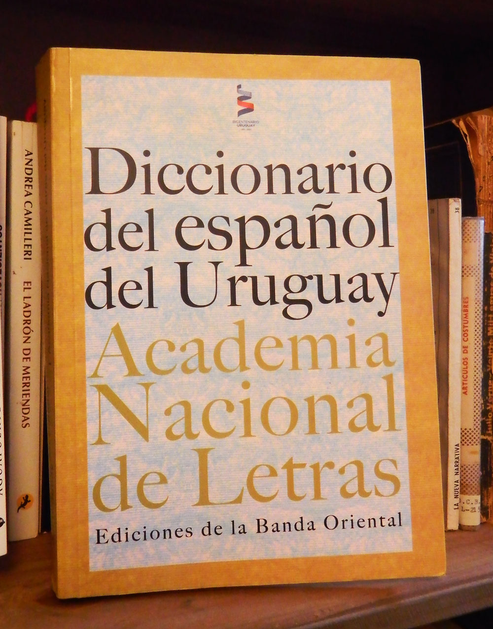 Diccionario del español del Uruguay (Academia Nacional de Letras de Uruguay), primera edición 2011